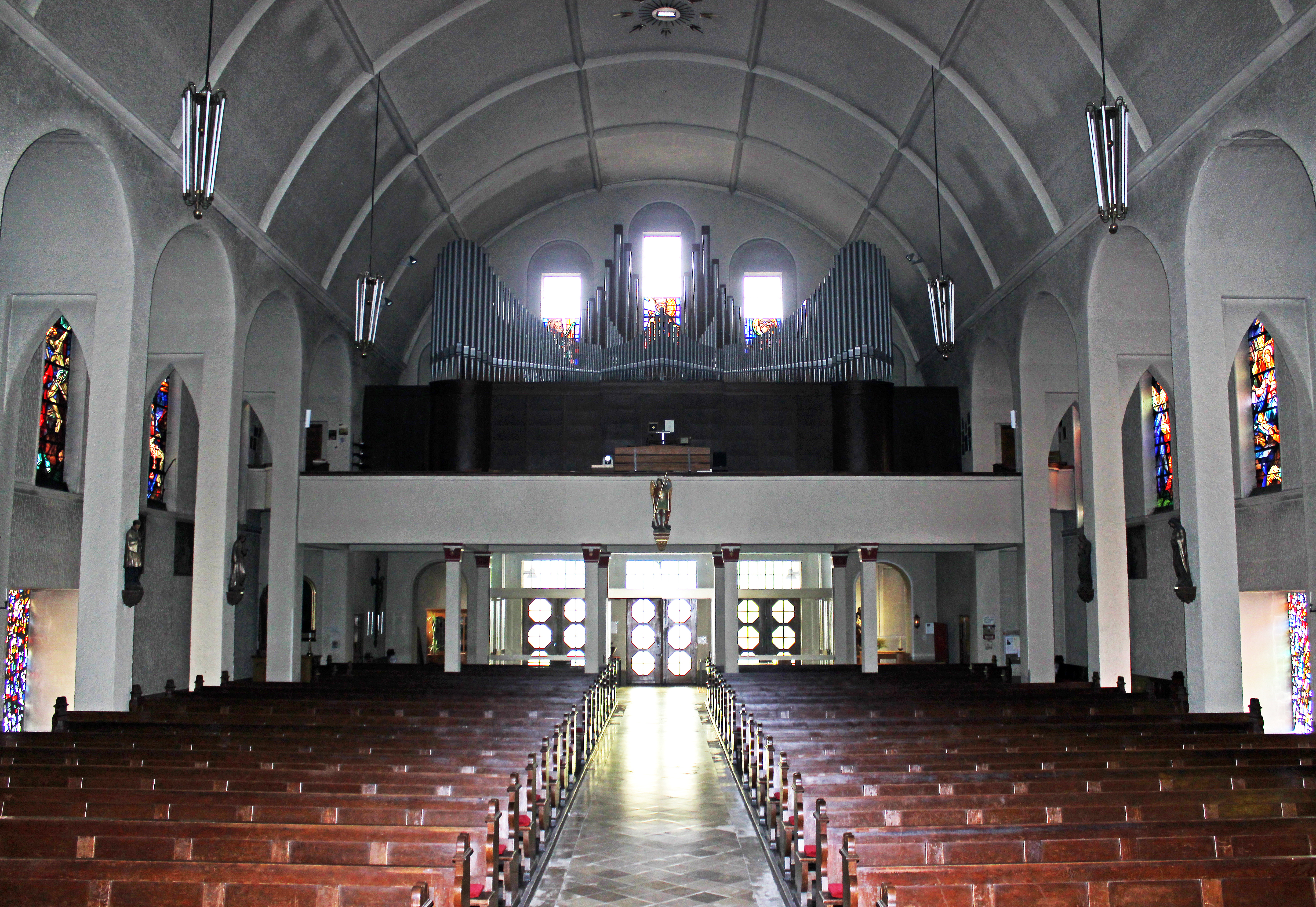 Oreglempore der katholischen Pfarrkirche St. Marien bzw. Sieben Schmerzen Mariä in Friedrichsthal (Saar), Regionalverband Saarbrücken, Saarland